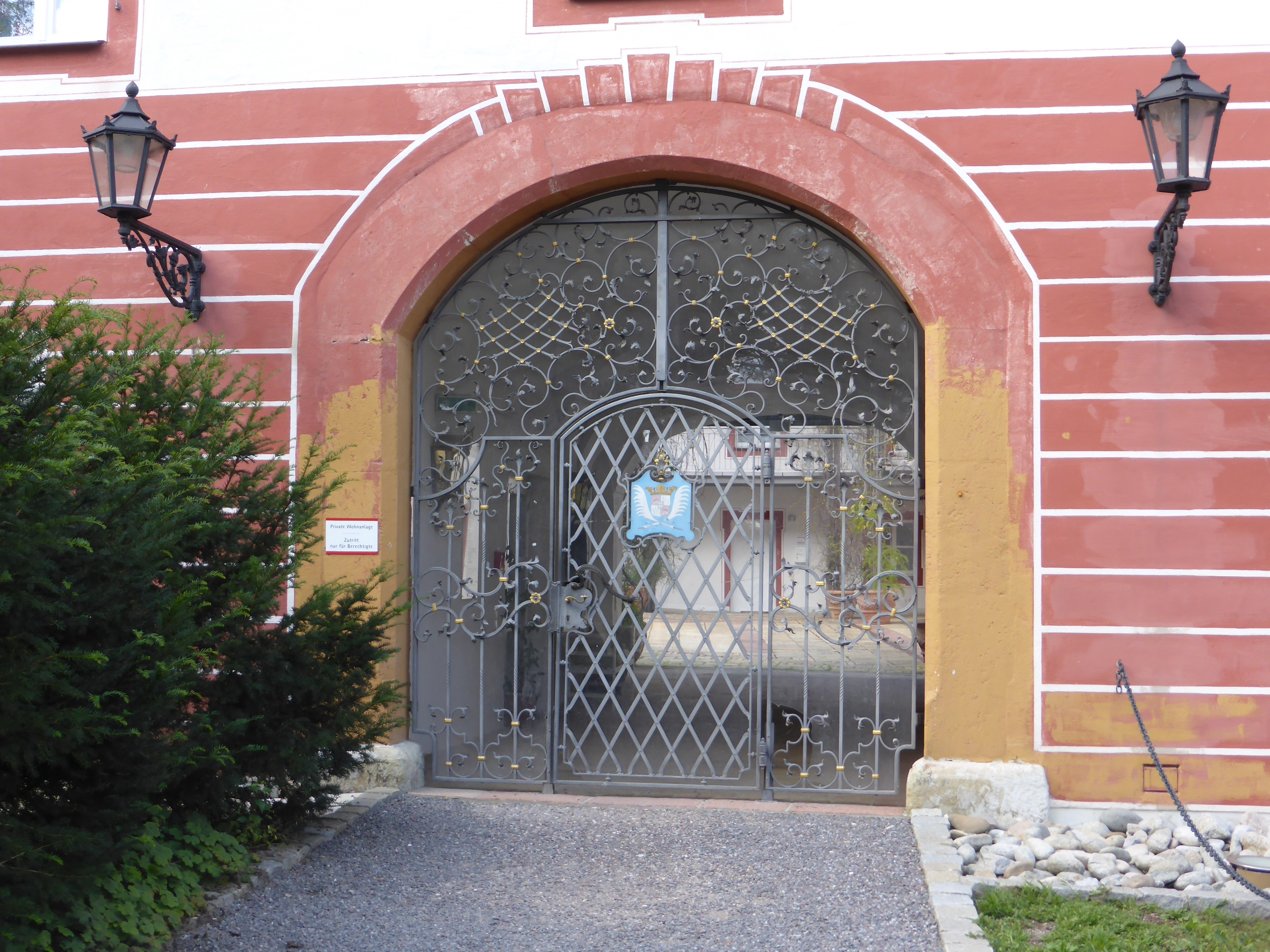 Wasserschloss Gebelkofen